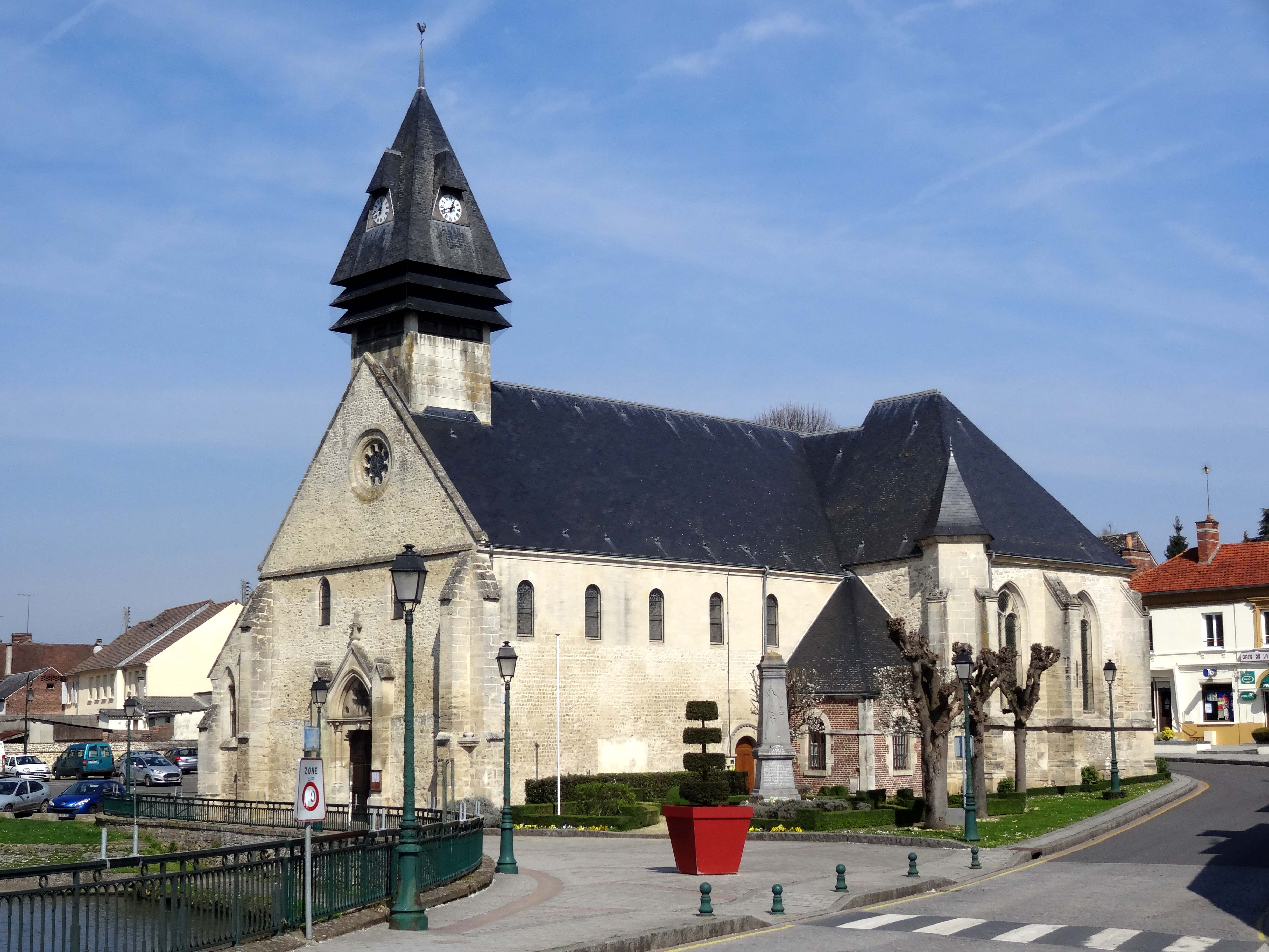 Église Saint-Vincent d'Hermes - voir titre.